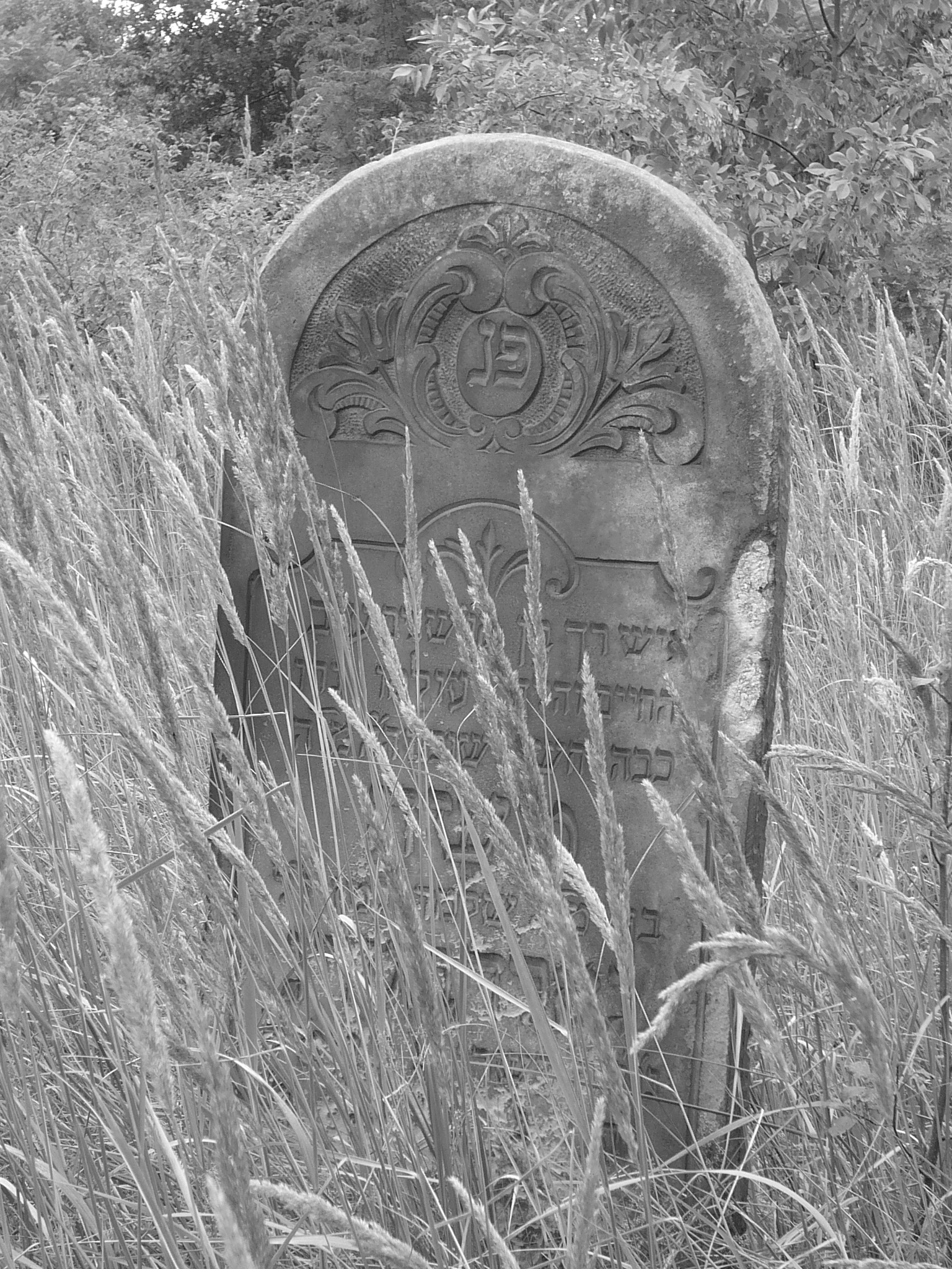 Macewy na cmentarzu żydowskim w Radomsku